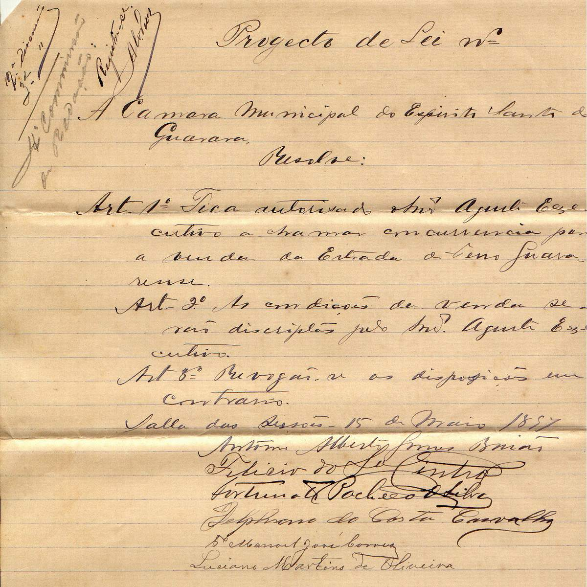 Projeto de Lei que culminou na venda da Estrada de Ferro Guararense em Guarará-MG